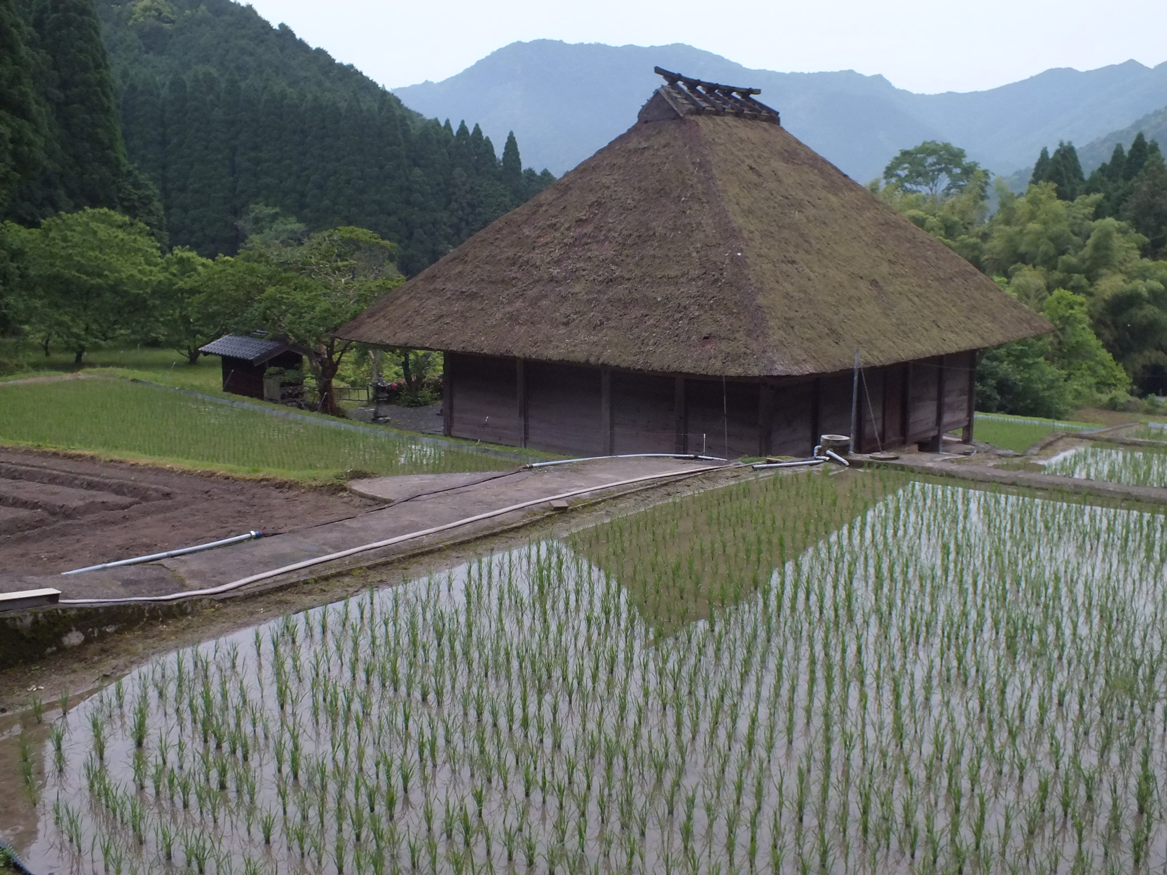 山本薬師堂 所在地 兵庫県丹波市山南町山本628番地 山号 野瀨倉山 院号 佛光寺藥師如來堂 （仏光寺薬師如来堂） 中興年 1395年（応永2年） 正式名 野瀨倉山佛光寺 藥師如來堂 別称 山本の薬師堂